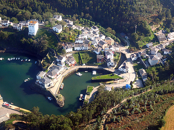 Foto aérea de Viavelez